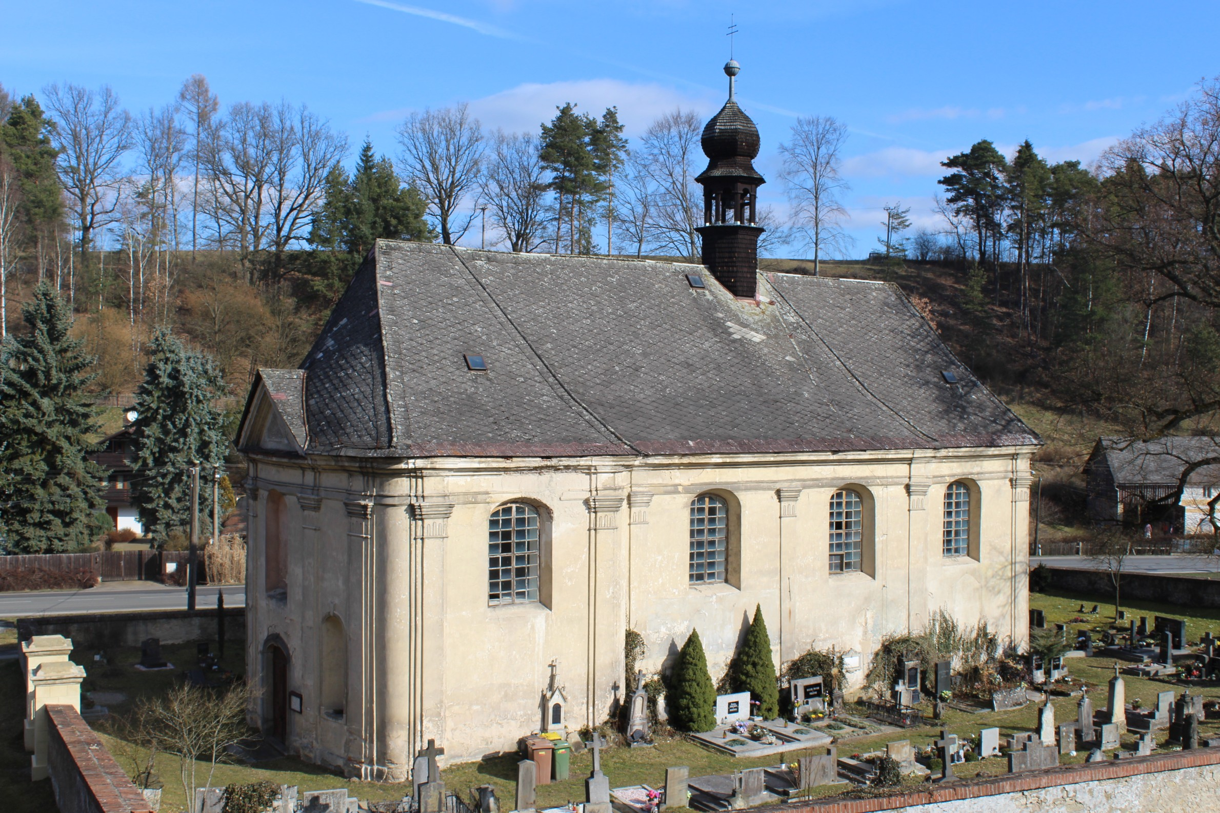 Dolní Krupá, kostel sv. Václava